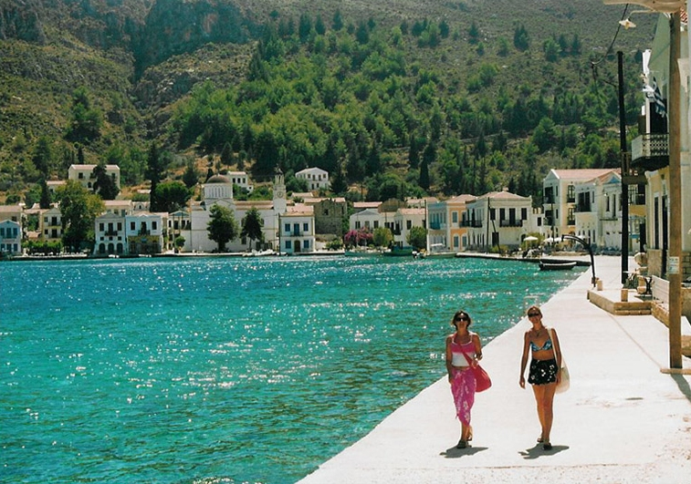 Castellorizzo/Megisti, Dodecaneso - Grecia - 2002